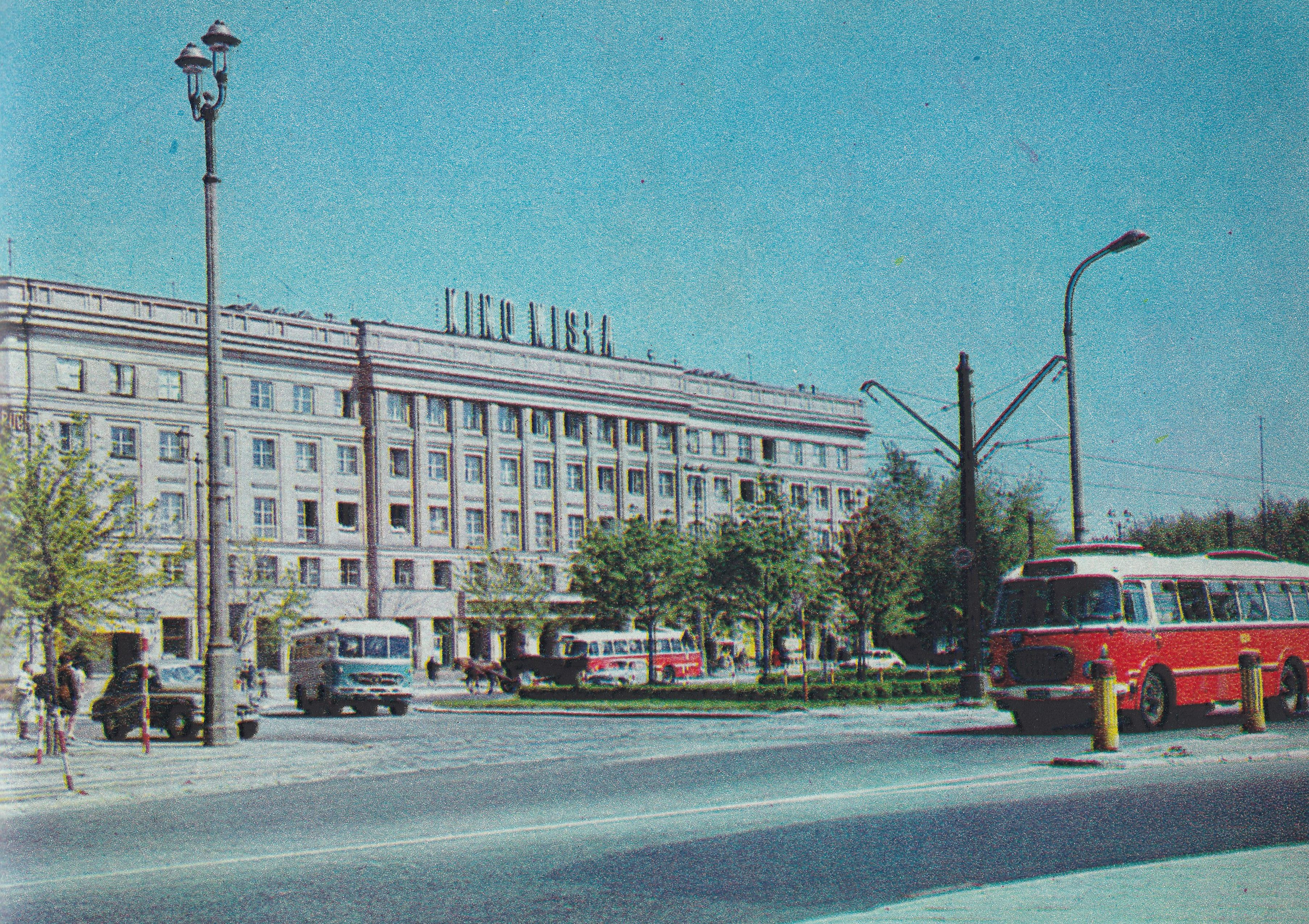 Plac Komuny Paryskiej (obecnie Wilsona) w Warszawie